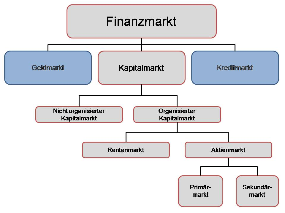 Unterscheidung der Finanzmärkte, Bezug auf Kapitalmarkt